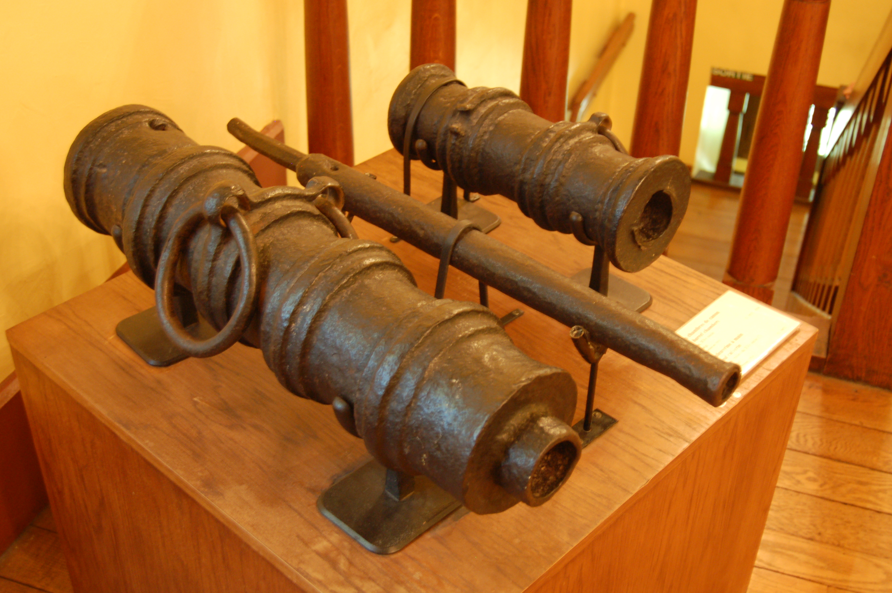 Canons exposés au Musée national du Moyen Âge à Paris.